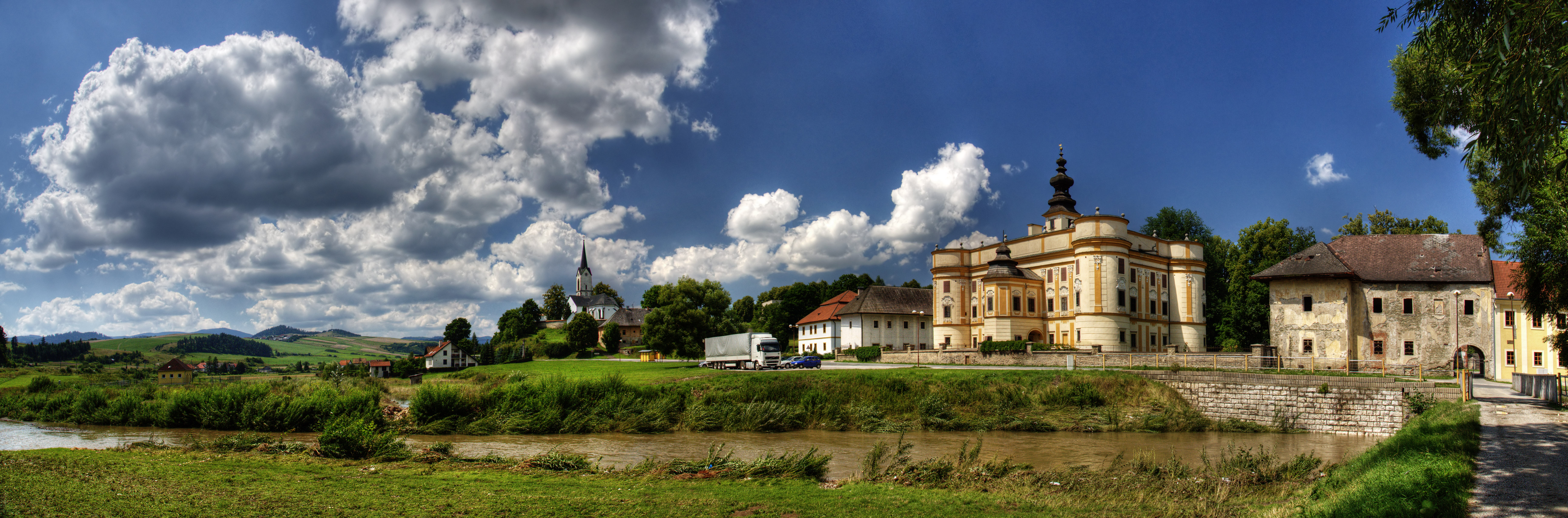 Markuszowce - panorama